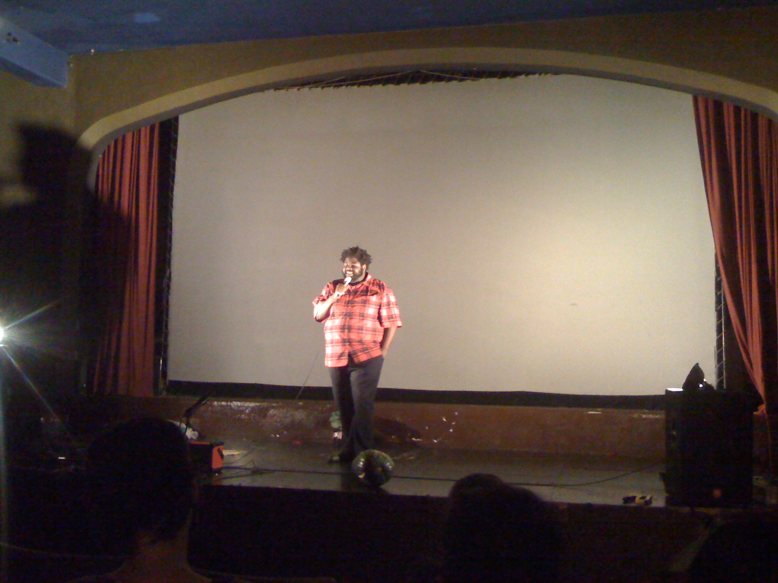 Ron Funches